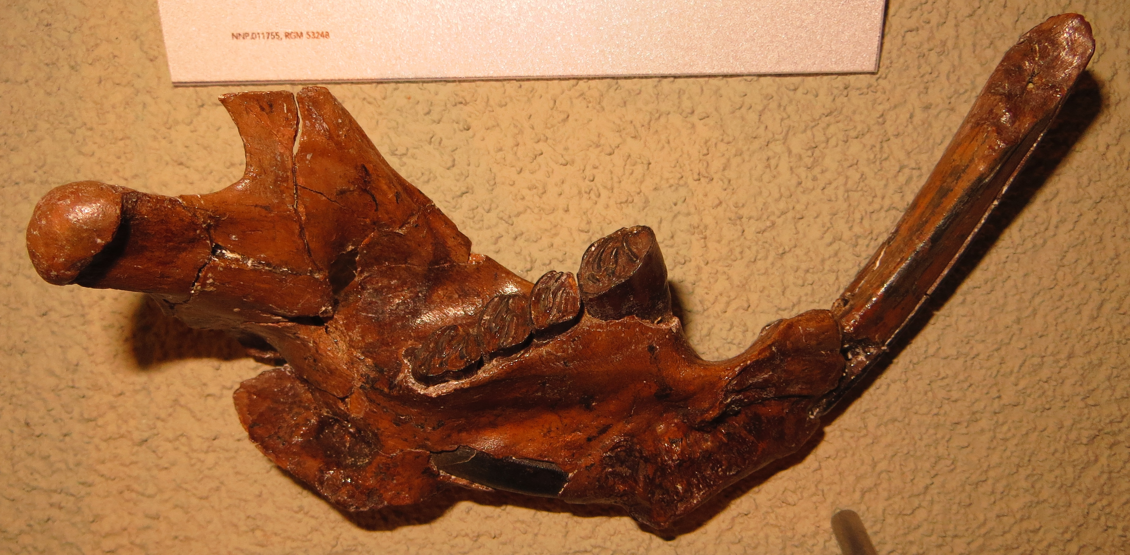 Fossil of Trogontherium, an extinct mammal - Took the picture at Naturalis, Leiden